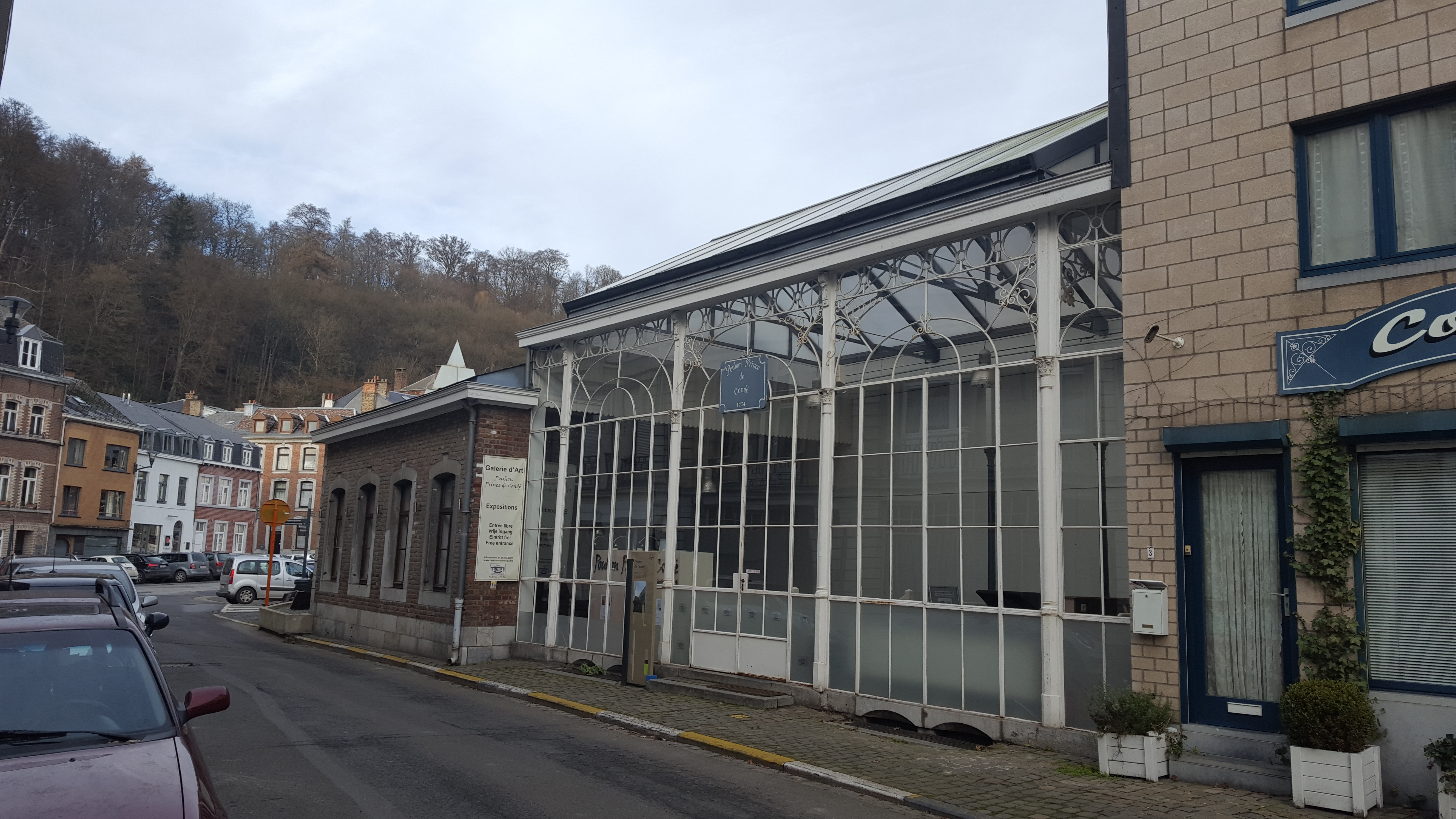 Source du Prince de Condé, Spa, Belgique